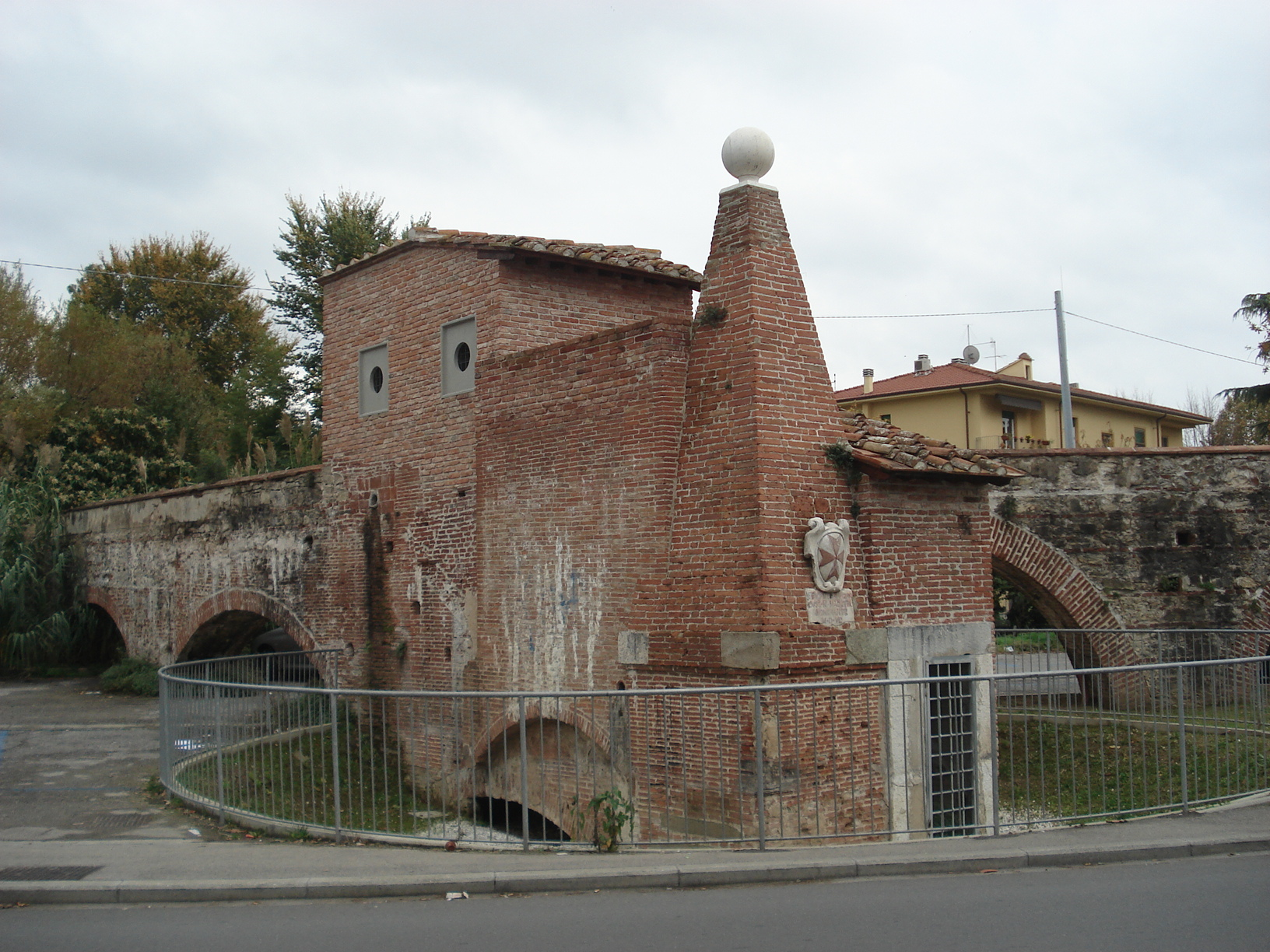 Curva dell'Acquedotto mediceo in via Battelli, Pisa. Struttura recentemente restaurata.